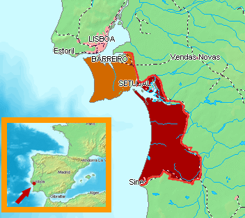 Wine Region Terras do Sado